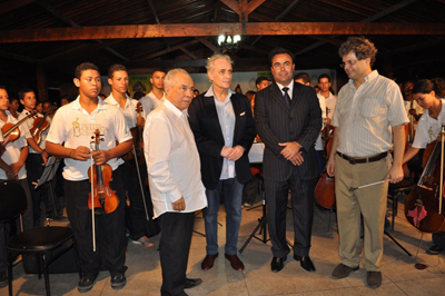 Em 2011, em passagem pelo Recife para um concerto, o tenor espanhol José Carreras conheceu pessoalmente a Orquestra Criança Cidadã